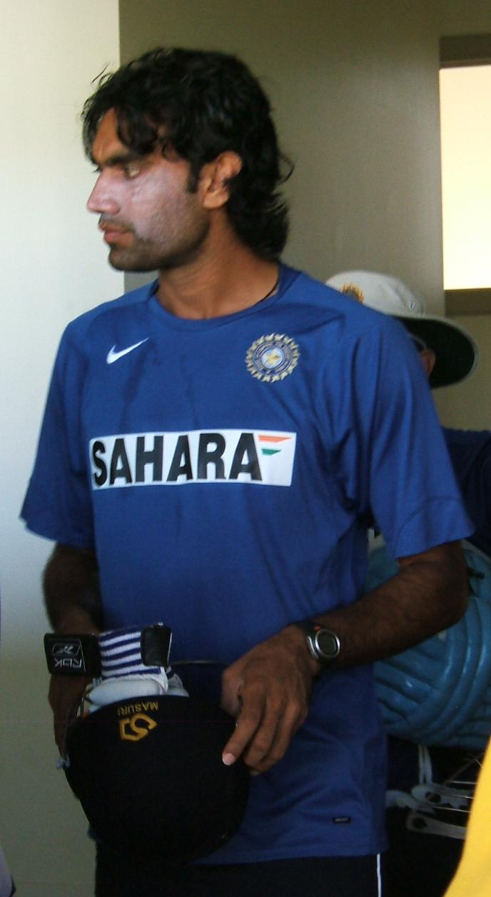 Munaf Patel at Adelaide Oval